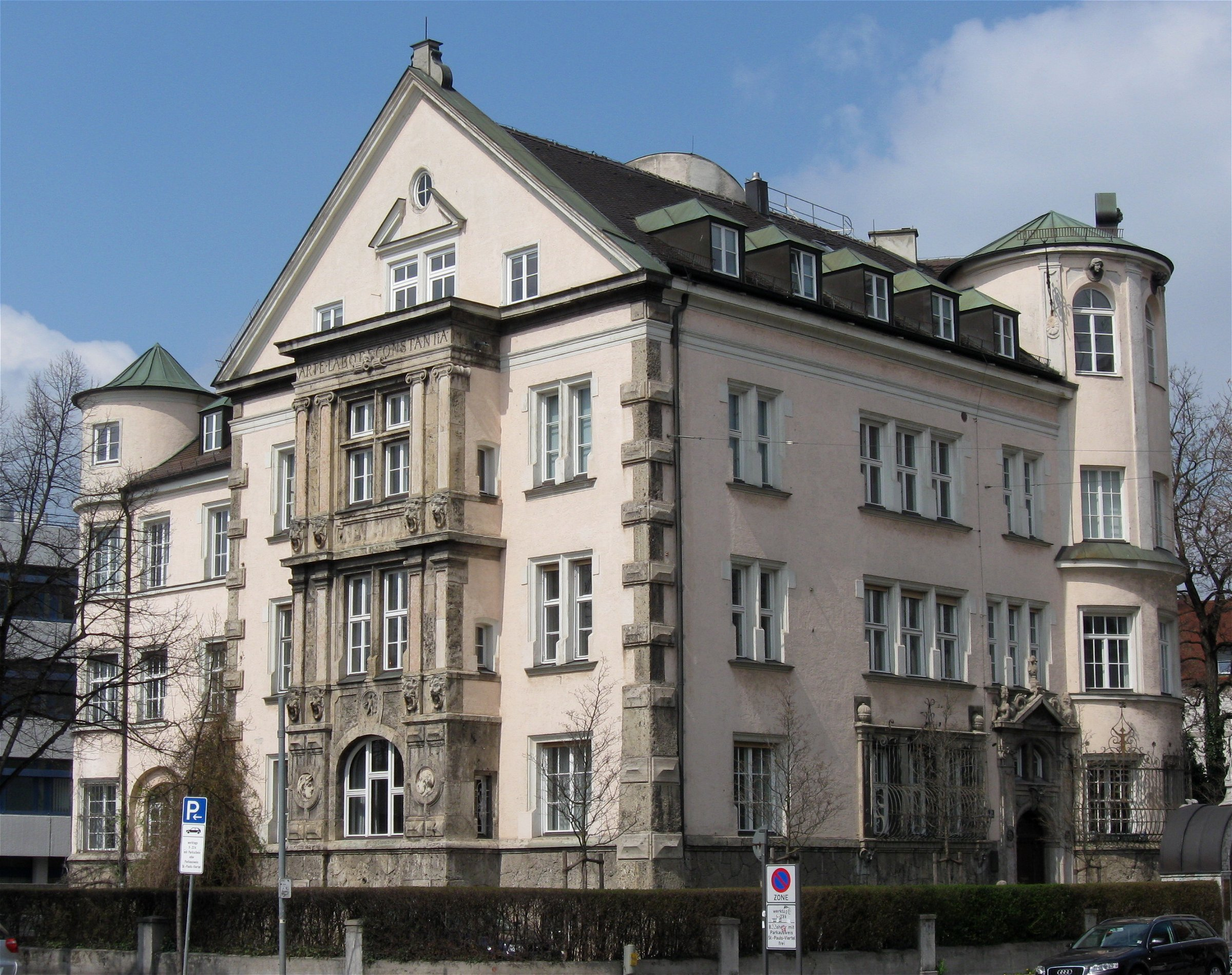 Bavariaring 10; Ehem. Wohnhaus von Emanuel von Seidl, von ihm selbst 1897–98 erbaut. Reich gegliederter Gruppenbau in Ecklage, deutsche Renaissance, mit reichem plastischem Dekor. Am südlichen Vorgartentor Ziergitter mit Namen des Erbauers zwischen Hermen, am östlichen, bogenförmigen Gartentor Georgsfigur nach Donatello. Städtebaulich im Zusammenhang mit der Paulskirche.